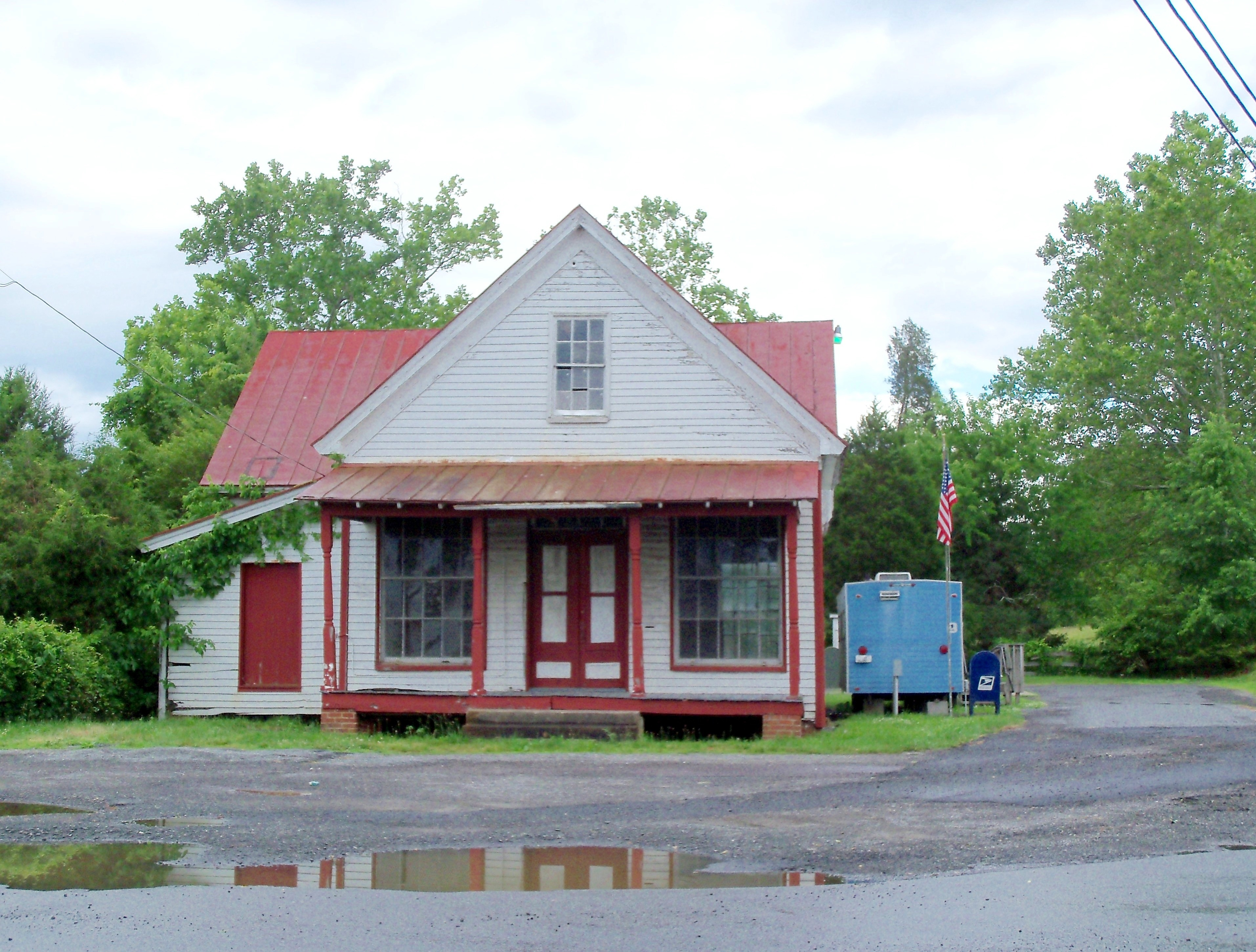 Locust Dale, VA, USA